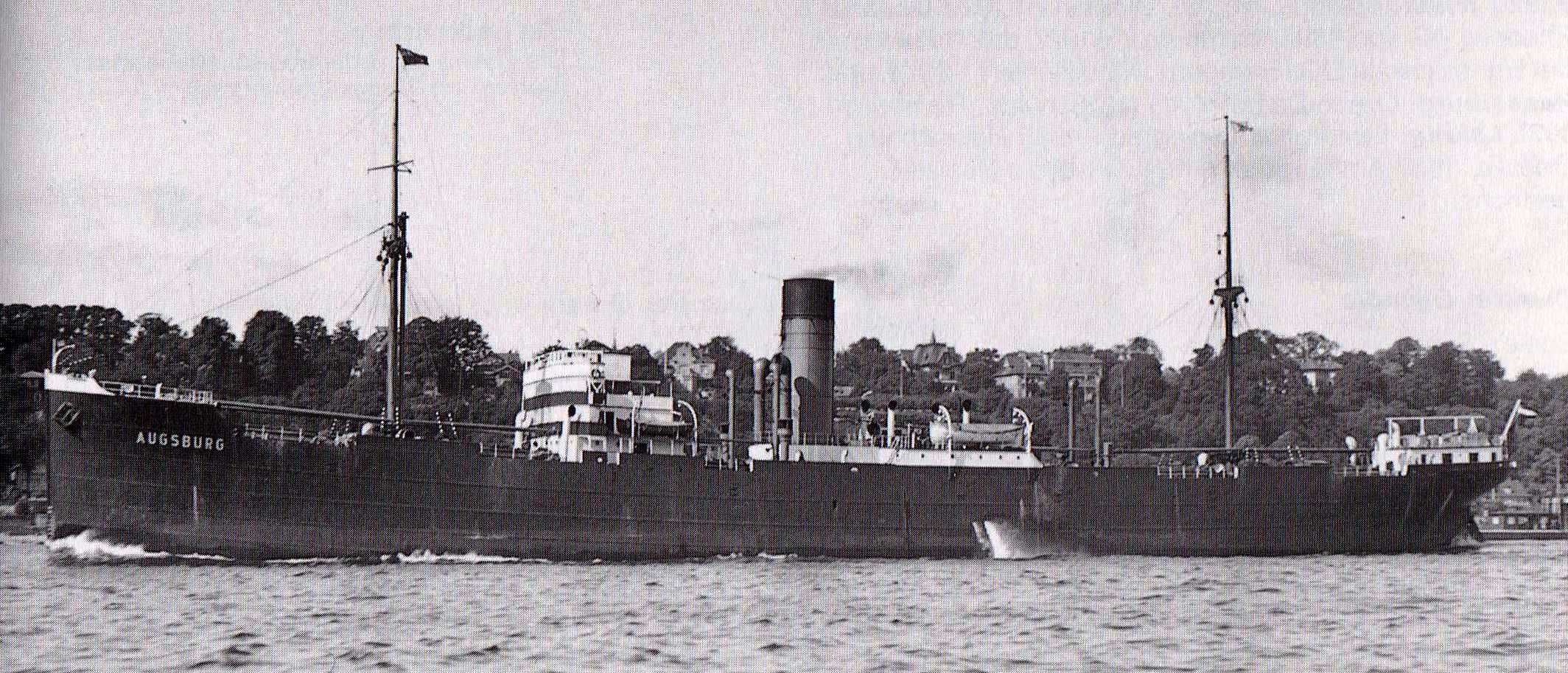 Das in Großbritannien angekaufte frachtschiff AUGSBURG des NDL